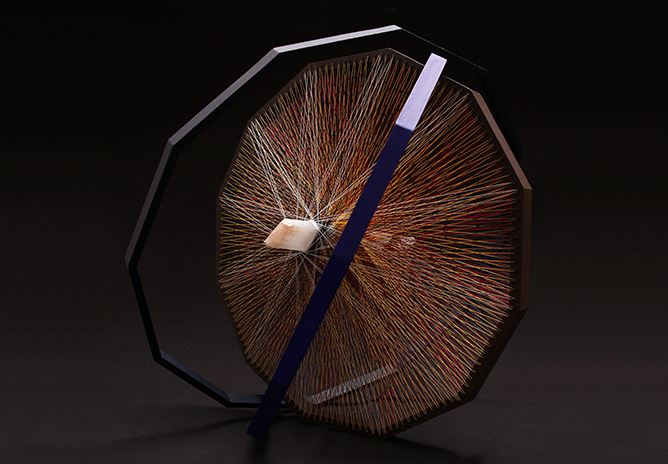 Sculpture géométrique